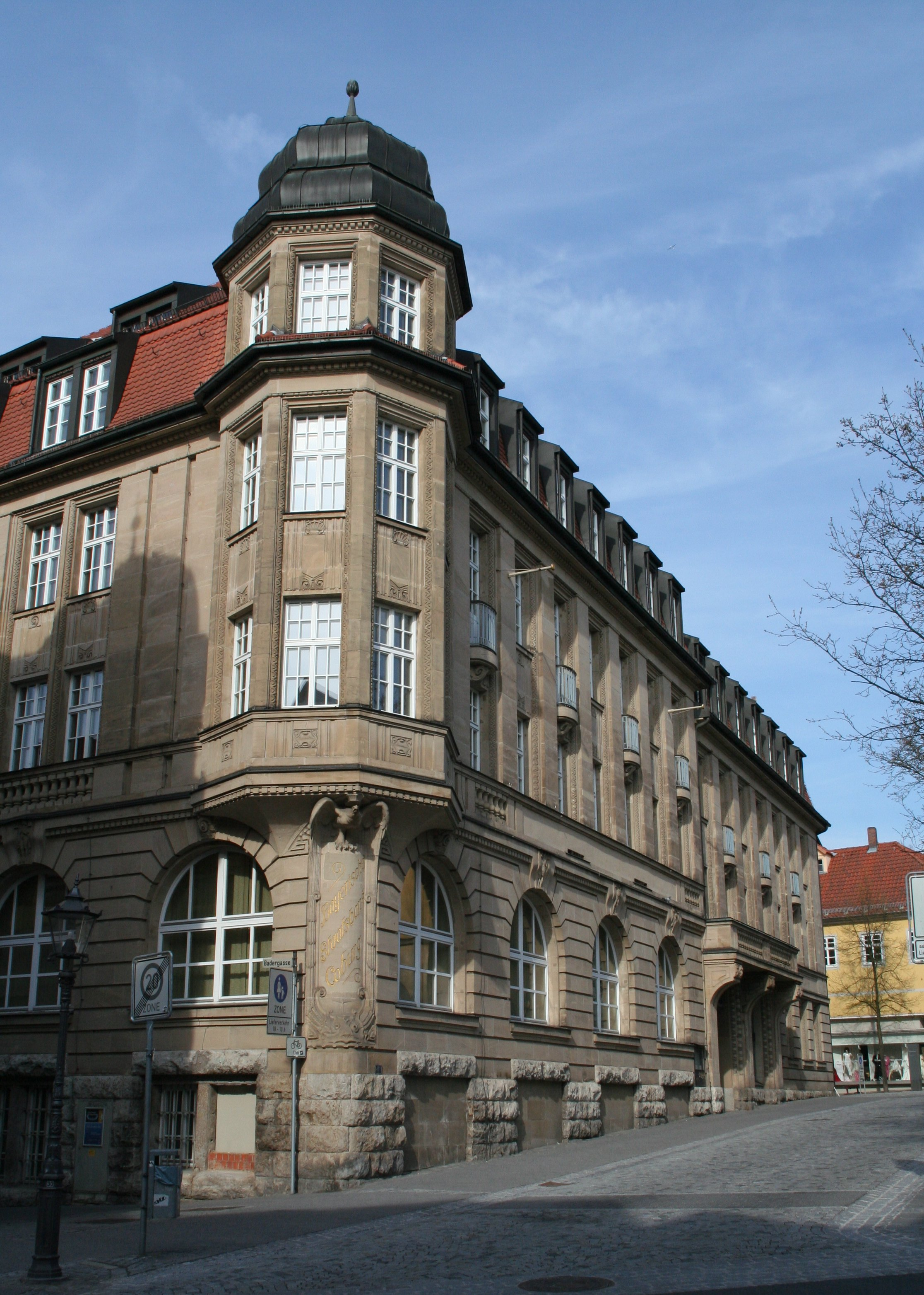 Coburg, Steinweg 5, ehem. bay. Staatsbank